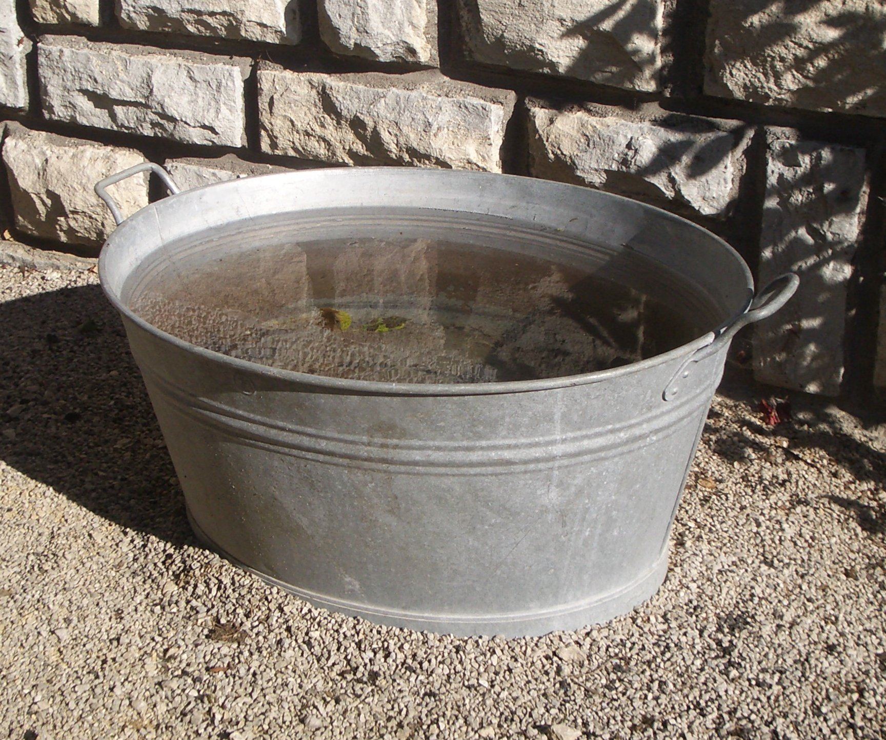 Zinkwanne